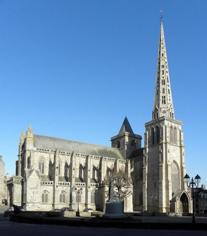 Basilique de Saint-Tugdual, Tréguier (22). .